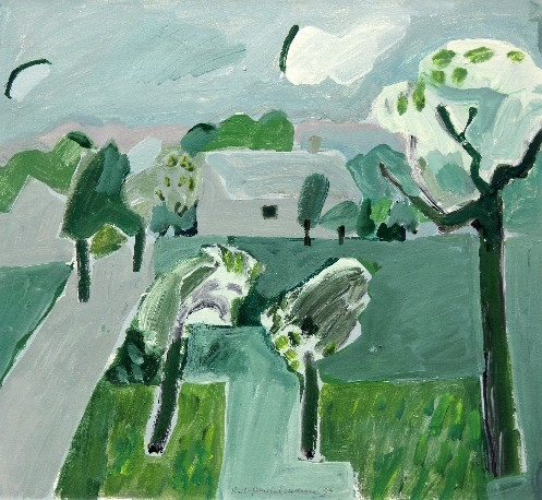 Öl auf Leinwand, 30 x 34 cm